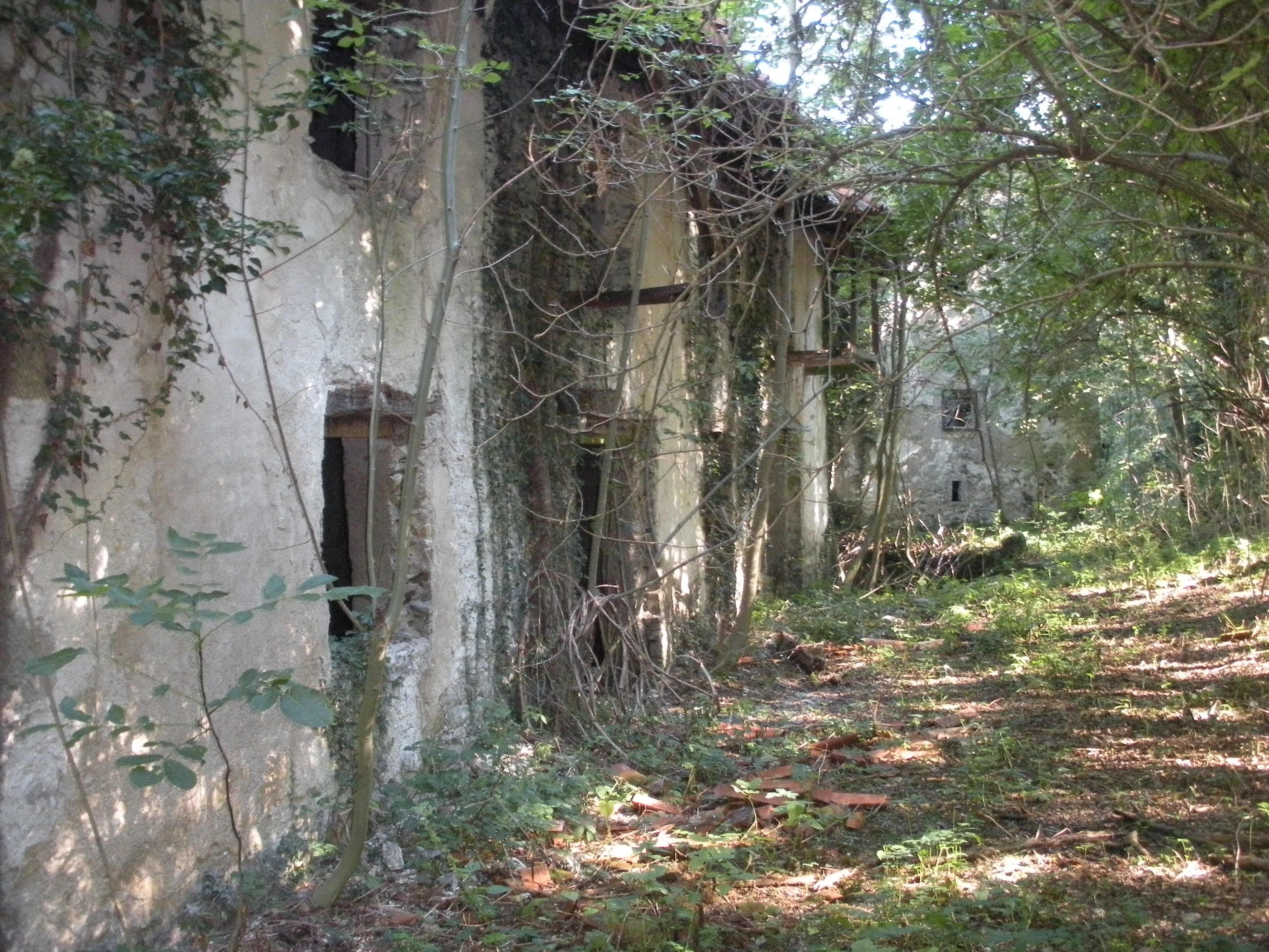 Villaggio di Velendol/Velindó/Velich